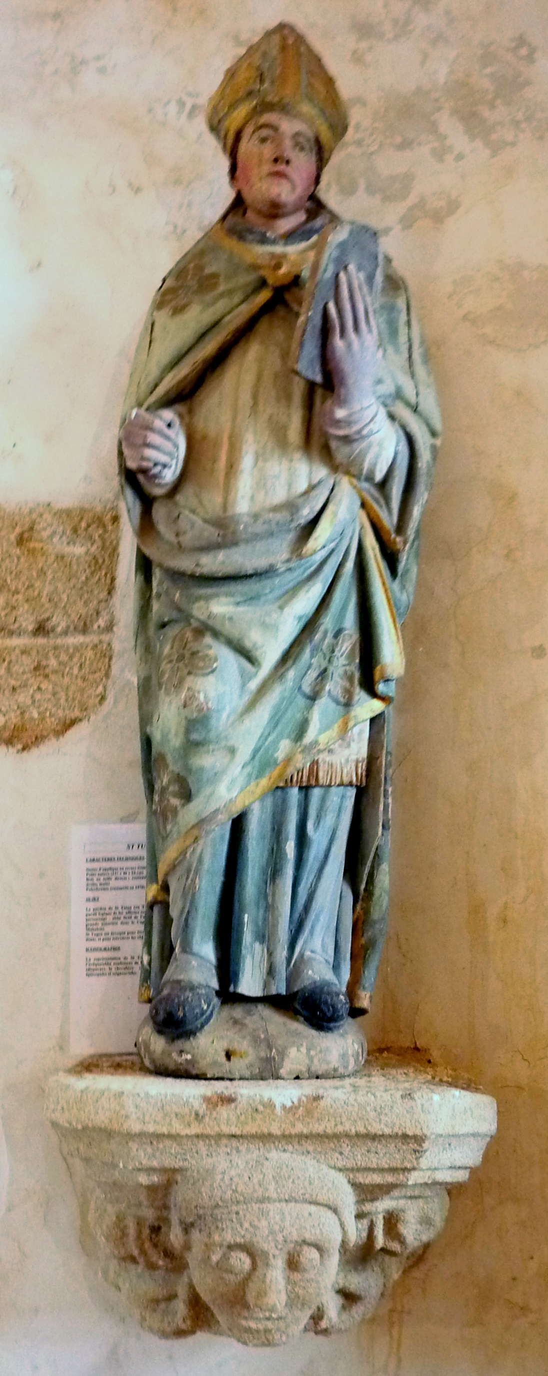 Plozévet, chapelle Saint-Démet : statue de saint Tugen (probablement). Il est représenté (c'est un stéréotype courant) en abbé (fictif) de l'abbaye de Daoulas, bien qu'il ne l'ait jamais été. Ce saint a une grande notoriété dans toute la région du Cap Sizun.